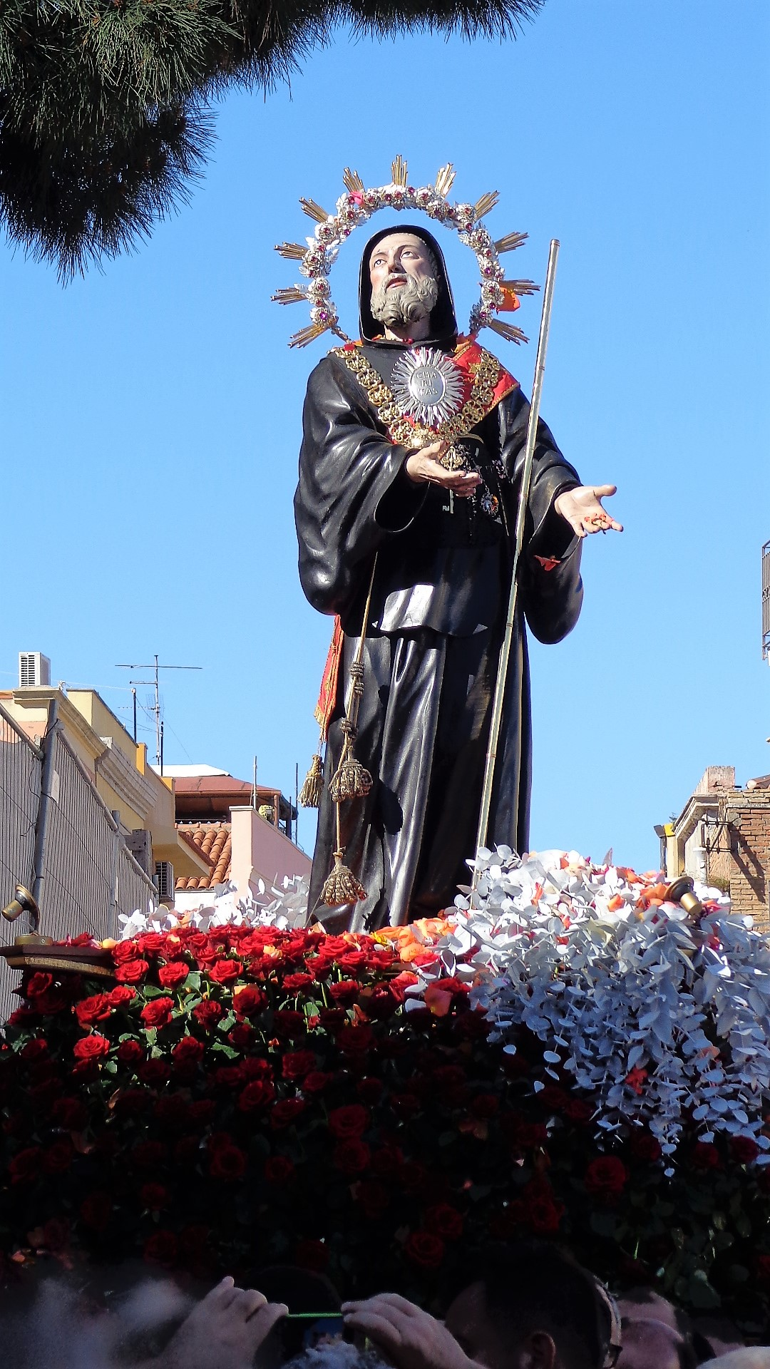 Simulacro di San Francesco di Paola durante la processione, salita al Castello. Sosta di fronte la chiesa del Rosario.